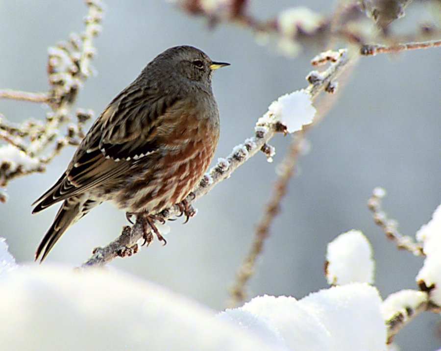 Alpenbraunelle Prunella collaris, Berchtesgaden area, Deutschland Photograph: Florian Schott